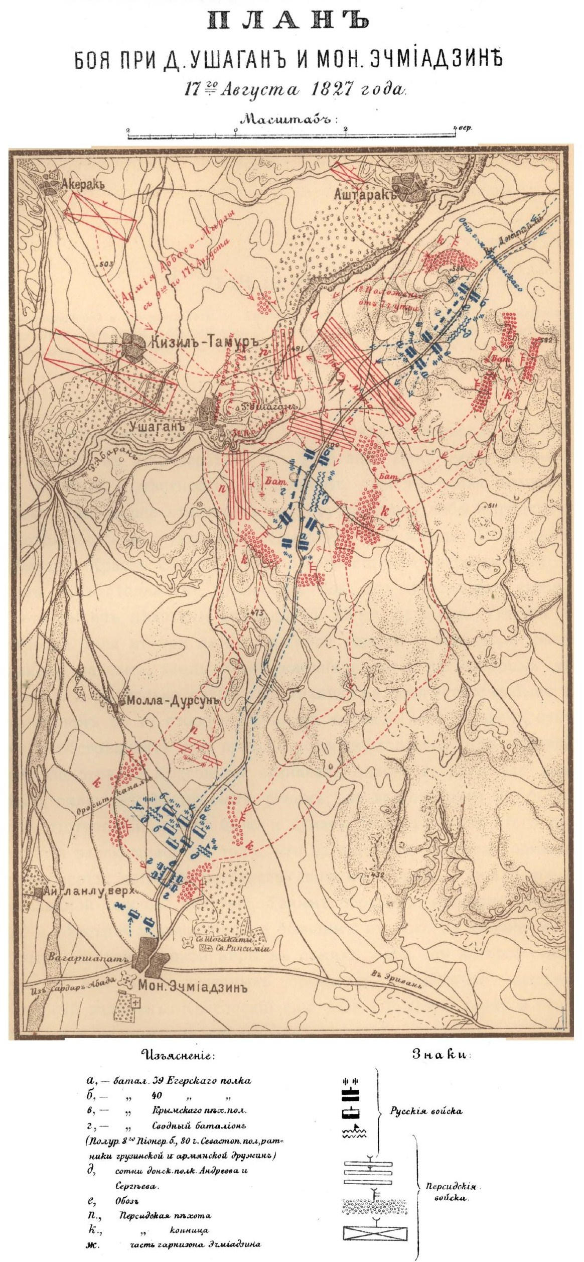 План боя при д. Ушаган и монастыре Эчмиадзин 17 августа 1827 года